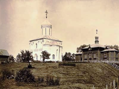 Zvenigorod.Uspensky Cathedral and the wooden church of the Holy Theophany. 1899 Звенигород. Успенский собор и деревянная церковь Богоявления Господня на Городке, 1899